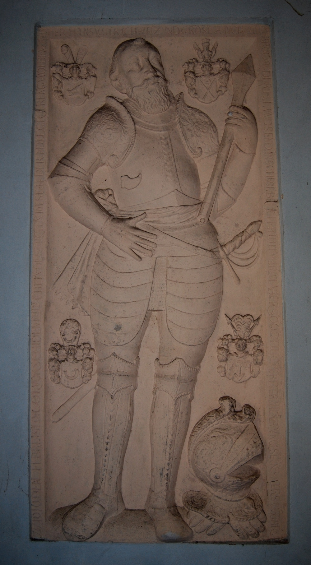 Renesansowa płyta nagrobna Hansa von Strachwitza, wykonana po 1601r. z piaskowca